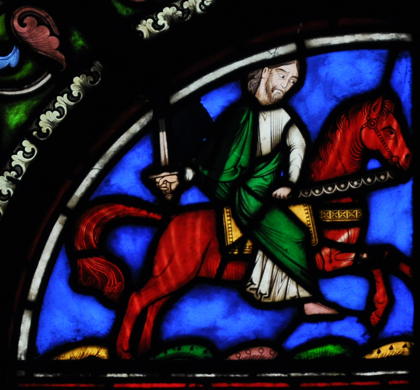 Vitrail de la Basilique Saint-Denis (chapelle Saint Cucuphas).Vitrail de l'Apocalypse: le deuxième cavalier (Apocalypse 6-4). Viollet-le-Duc et Alfred Gérente, 1854.